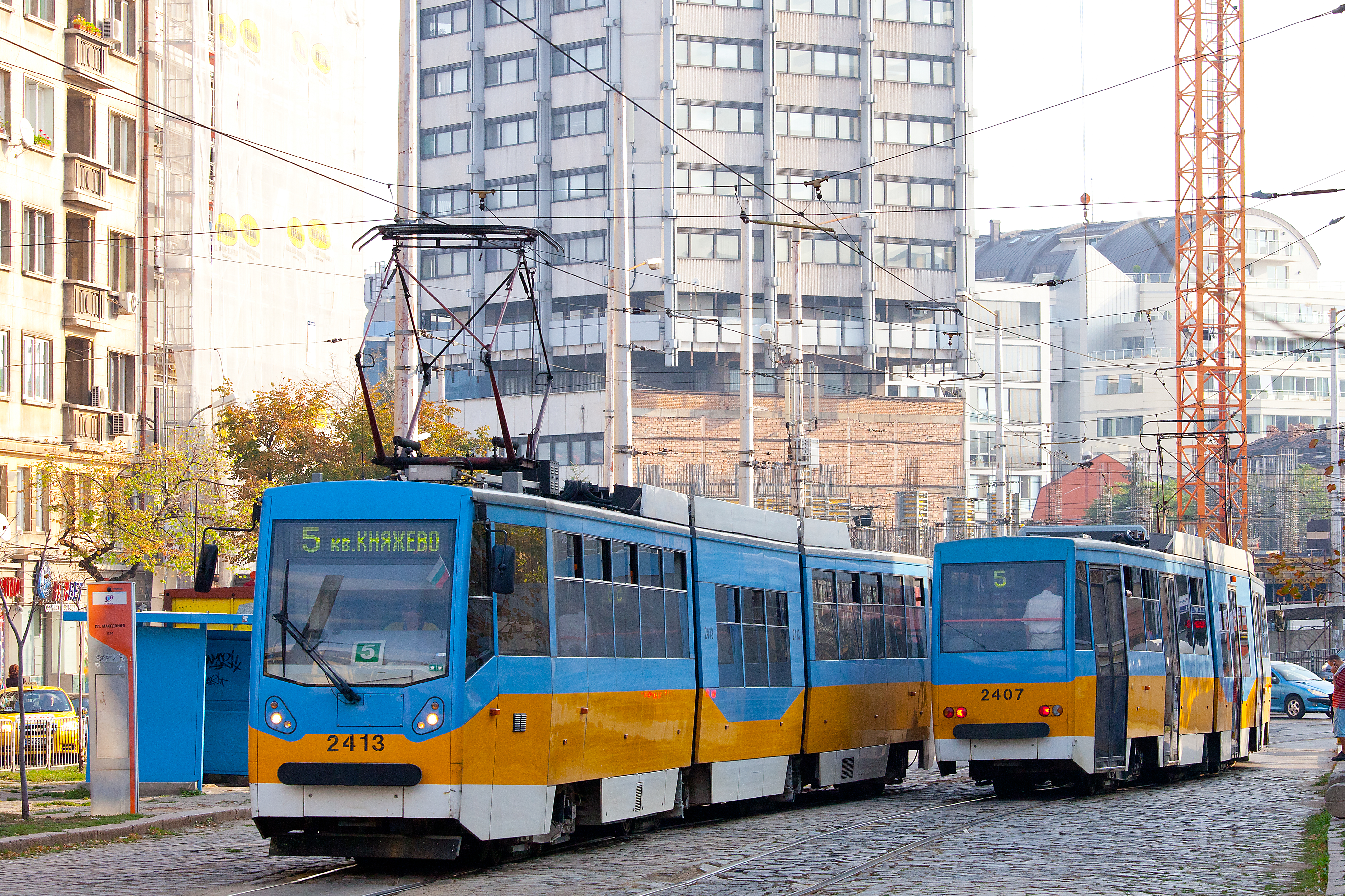 Straßenbahn in Sofia